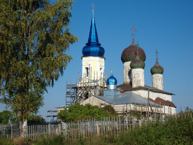 Вид со стороны придела св. Сергия Радонежского (юго-востока)